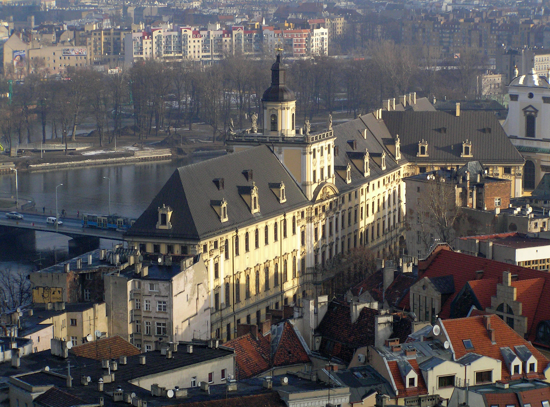 pl: Gmach główny Uniwersytetu Wrocławskiego we Wrocławiu (Polska). en: Main building of the Wrocław University in Wrocław (Poland). Author: Maciej Dembiniok 2005